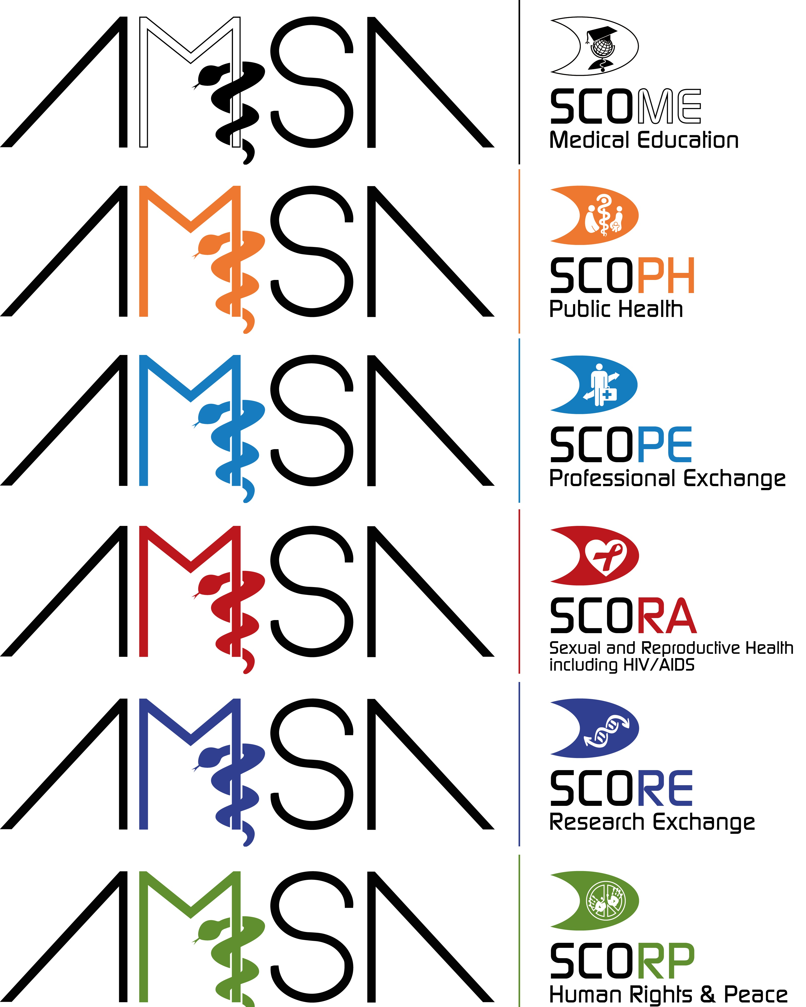 Die Bereiche der AMSA